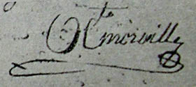 Firma de Hipólito Mordeille